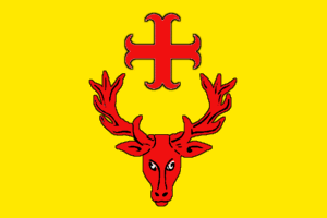 Drapeau de Holling